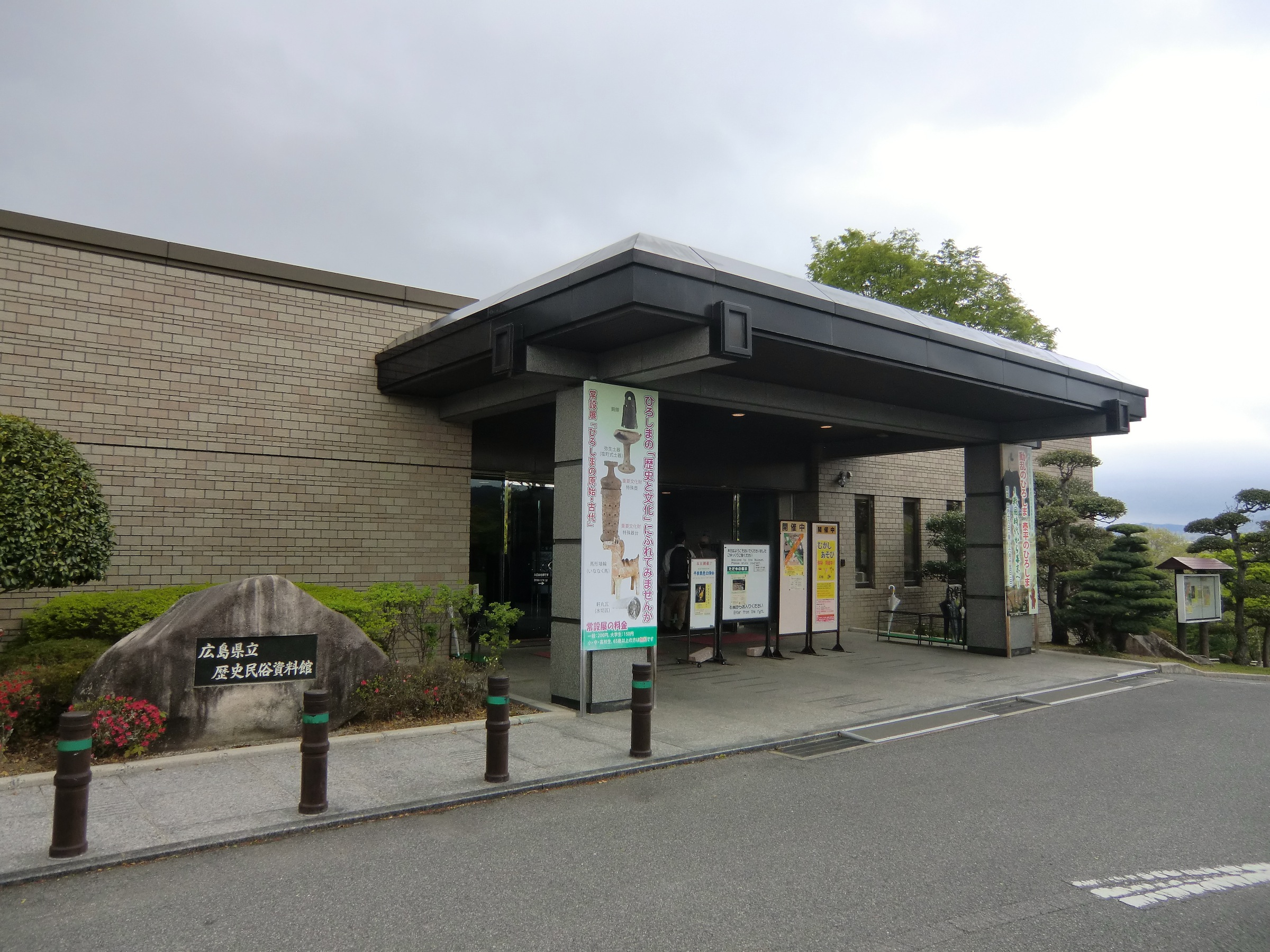 みよし風土記の丘内にある広島県立歴史民俗資料館（三次市）